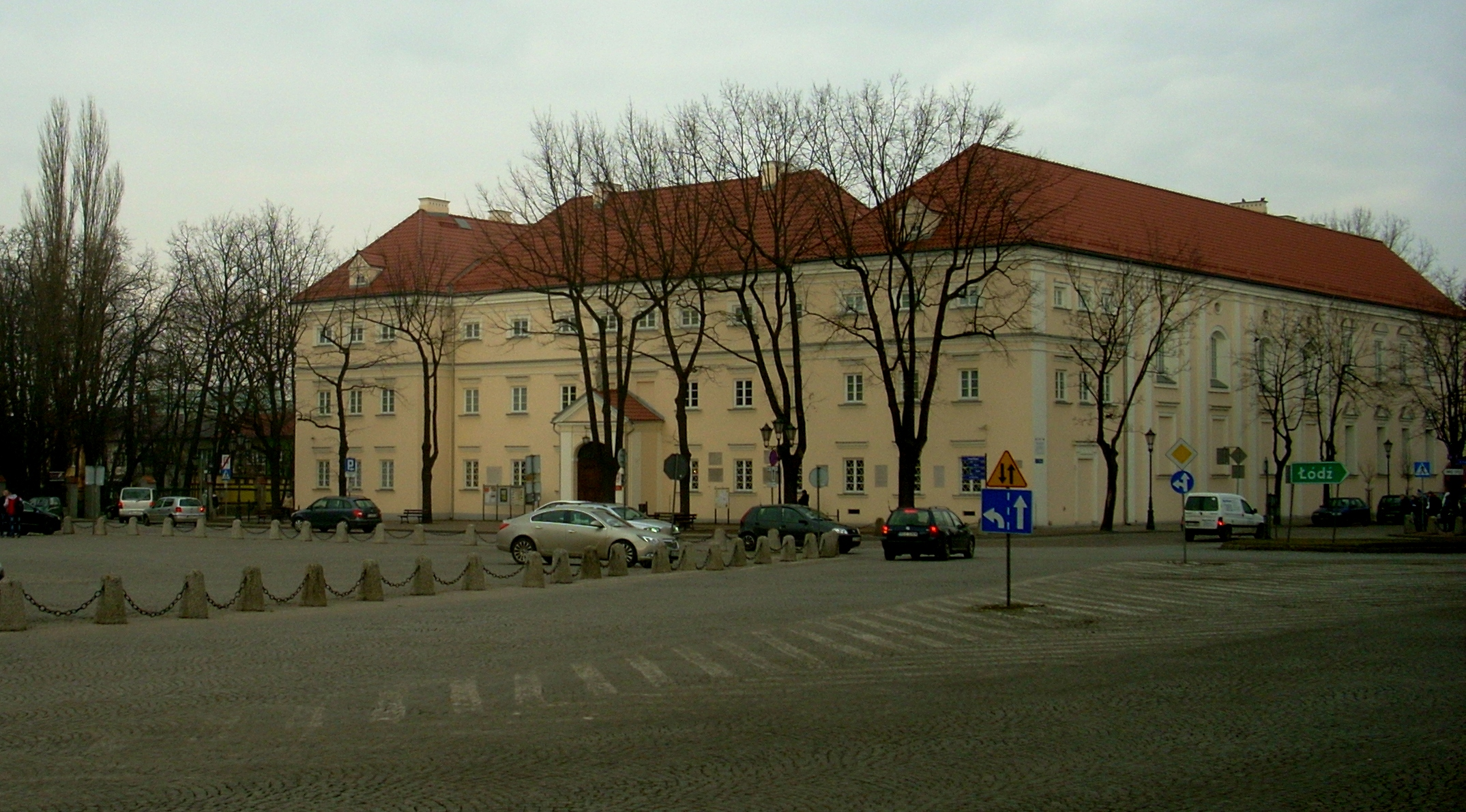 Budynek Muzeum w Łowiczu